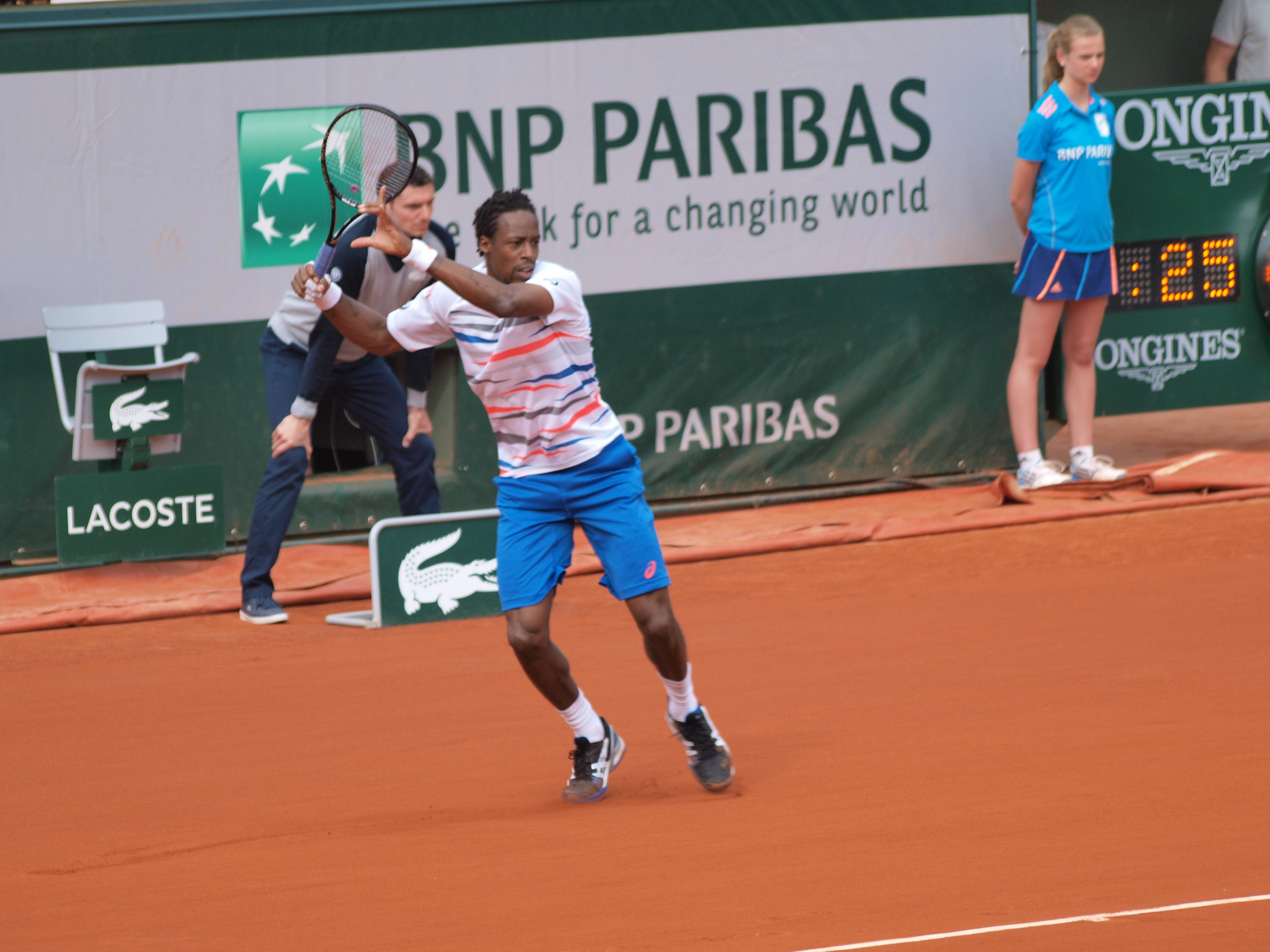 Internationaux de France de tennis, le 2 juin 2014, sur le court Philippe Chatrier : Gaël Monfils